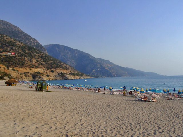 Oludeniz